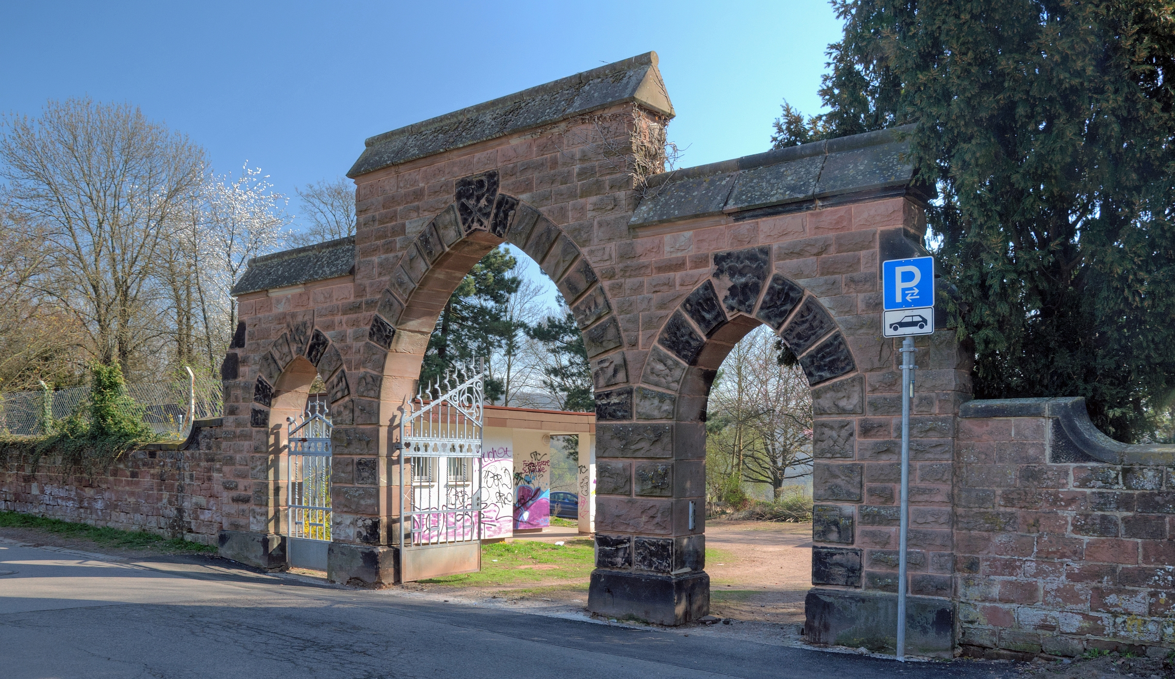 Eingangsportal des Friedhofs am Jenneweg, Saarbrücken